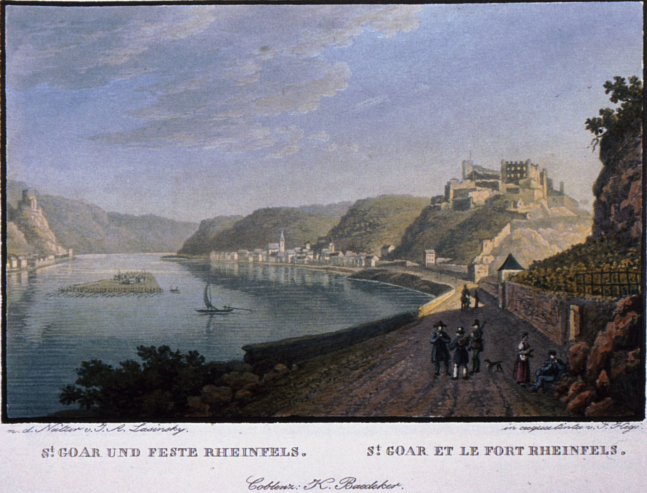 Blick auf St.Goar mit Ruine Rheinfels um 1830 Altkolorierter Aquatintastich von Franz Hegi nach Vorlage von J.A. Lasinsky um 1830